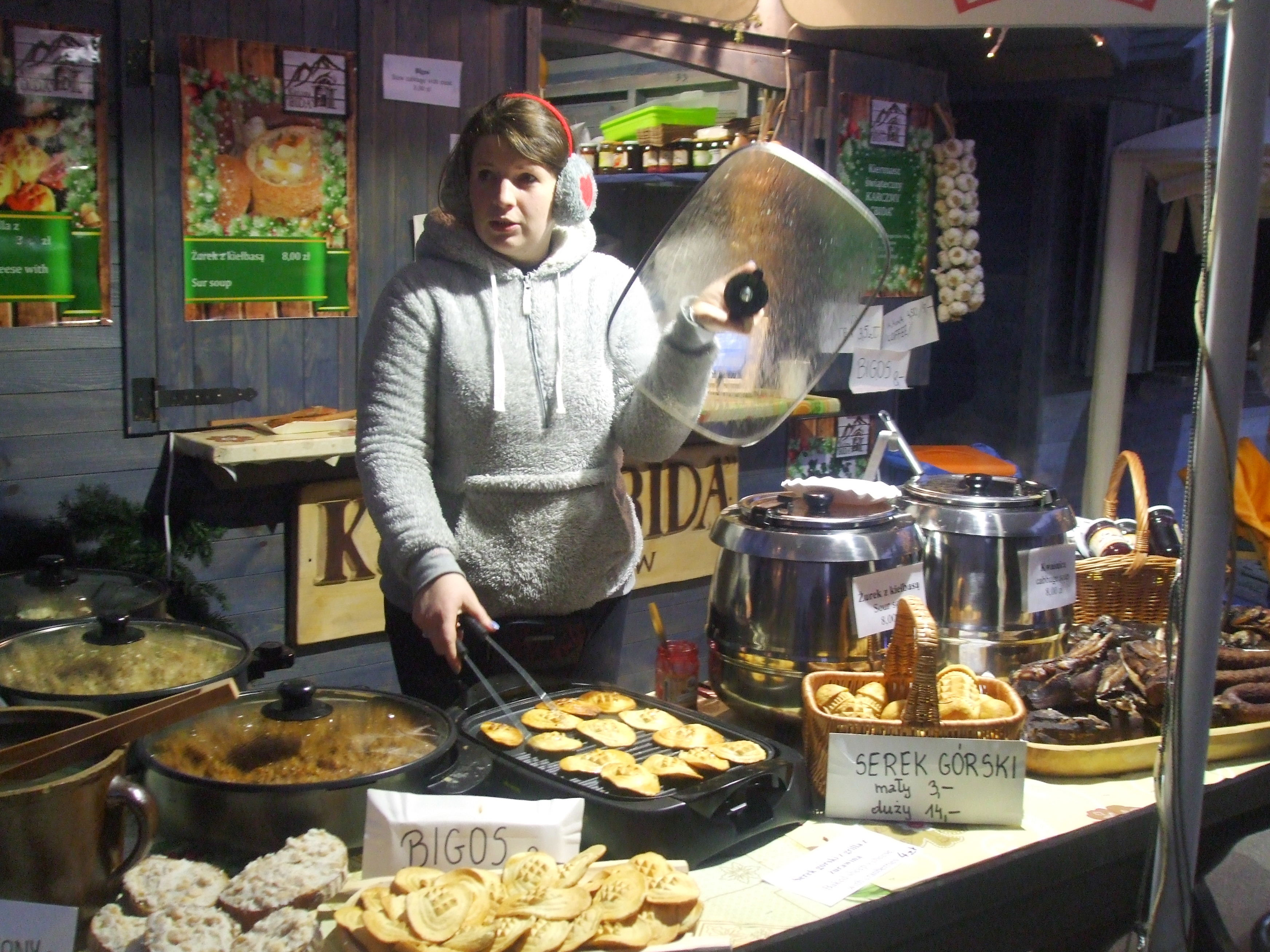 Разнообразные блюда польской национальной кухни